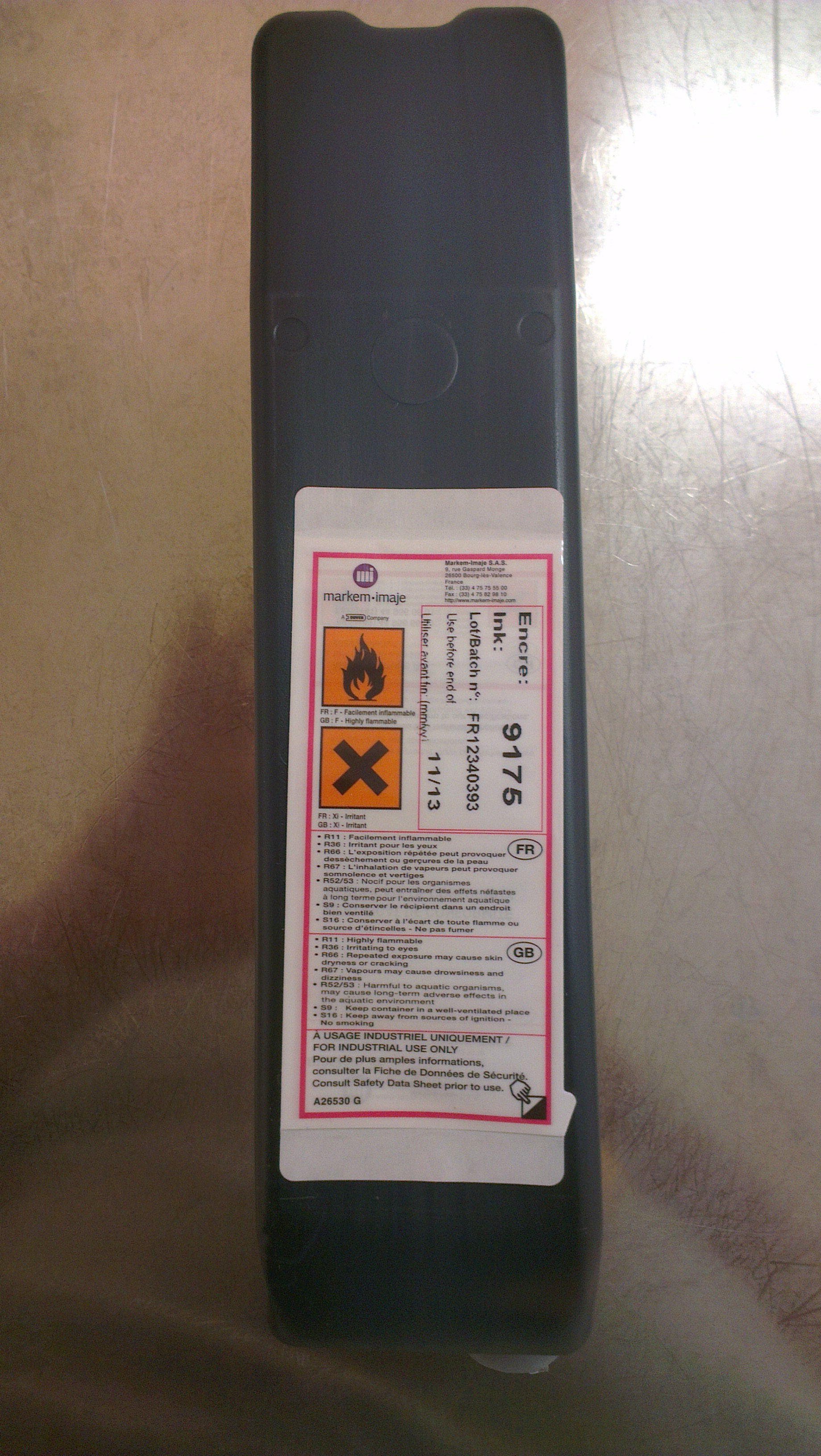 Na sliki je črnilo (ink) za ink-jet tiskalnik